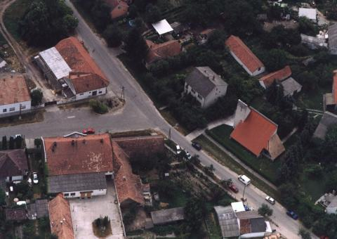 Dunafalva, Hungary, aerialphotogrpahy